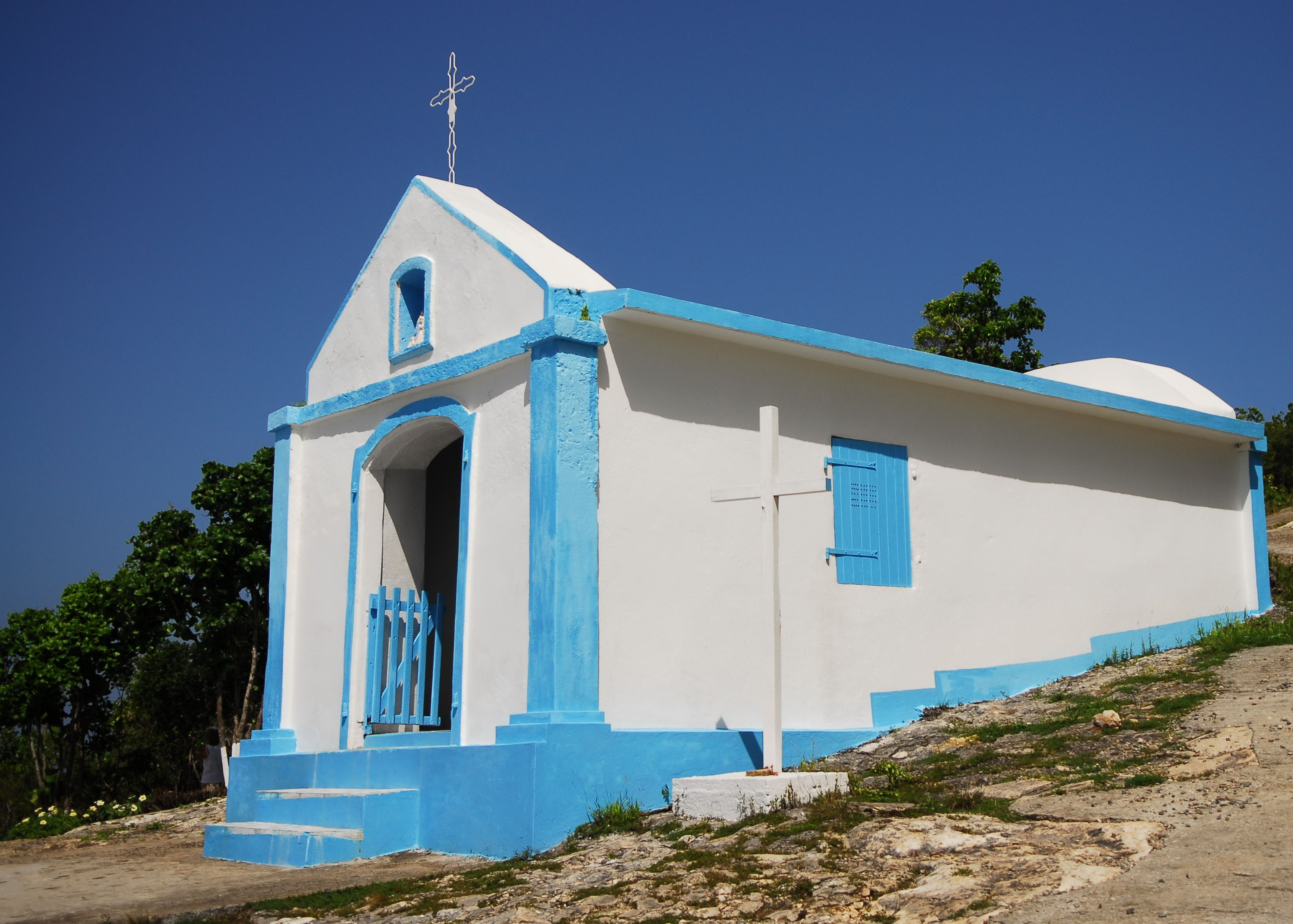 Cette chapelle, Notre-Dame du Calvaire, qui date de 1905 et a connu de nombreuses restaurations, offre, outre son caractère religieux, un des plus beaux point de vue sur La Désirade et les îles environnantes.